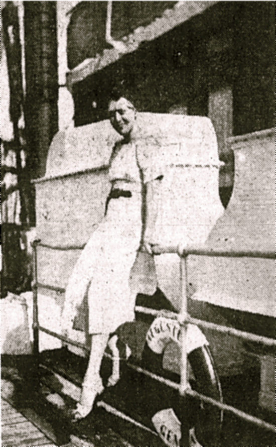 A corredora francesa Hellé Nice, a bordo do navio "Augustus", que a trouxe ao Brasil, em 1936.